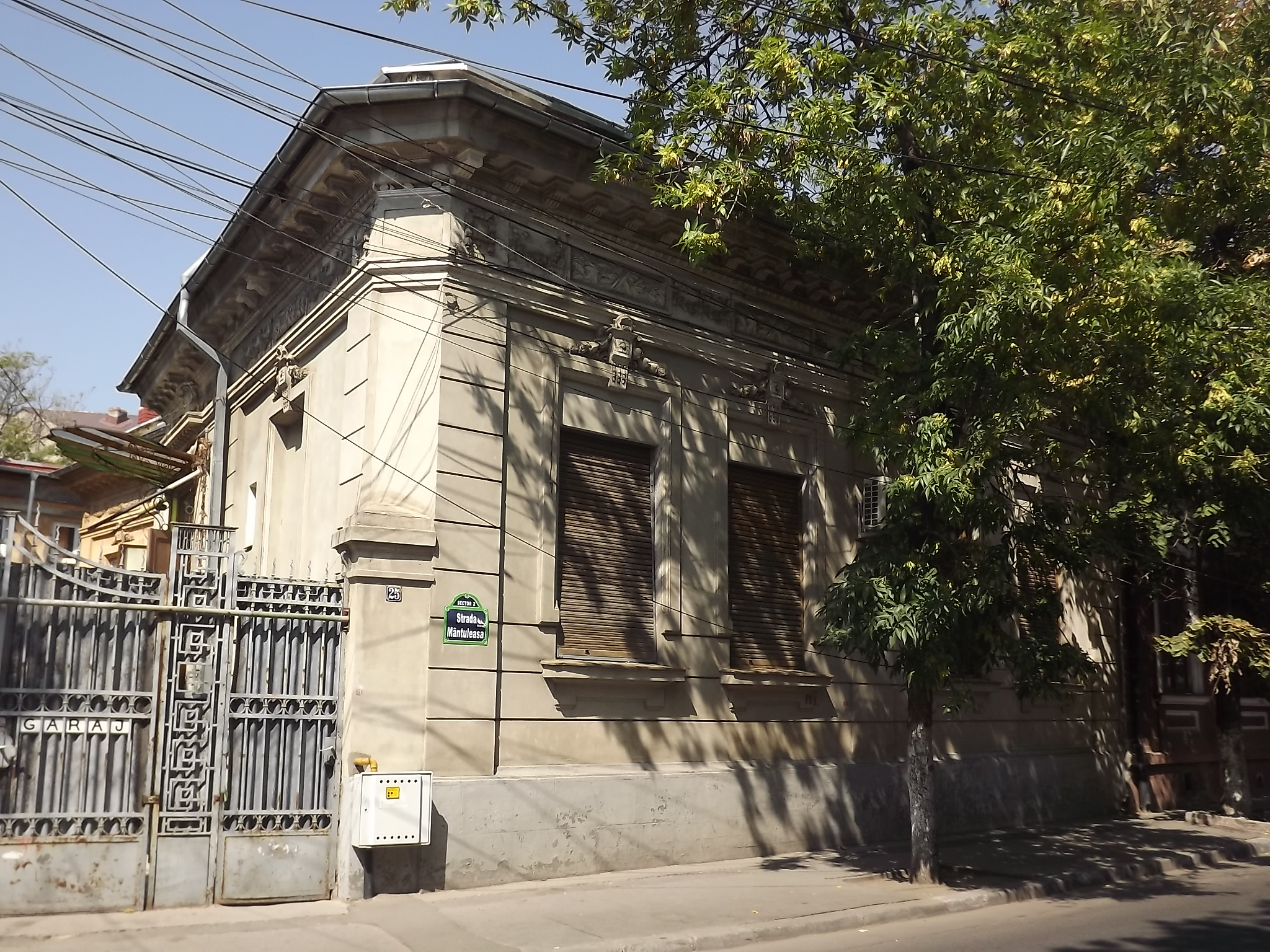 Casa arh. Paul Smărăndescu